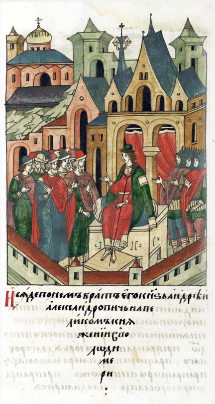 ЛИЦЕВОЙ ЛЕТОПИСНЫЙ СВОД И сел после него брат его, князь Андрей Александрович, на великом княжении во Владимире.